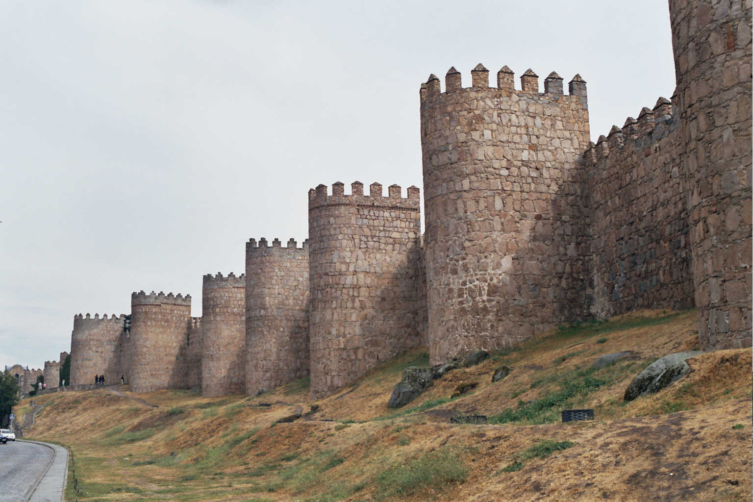 Muralles en Ávila. (Castilla y León. España).